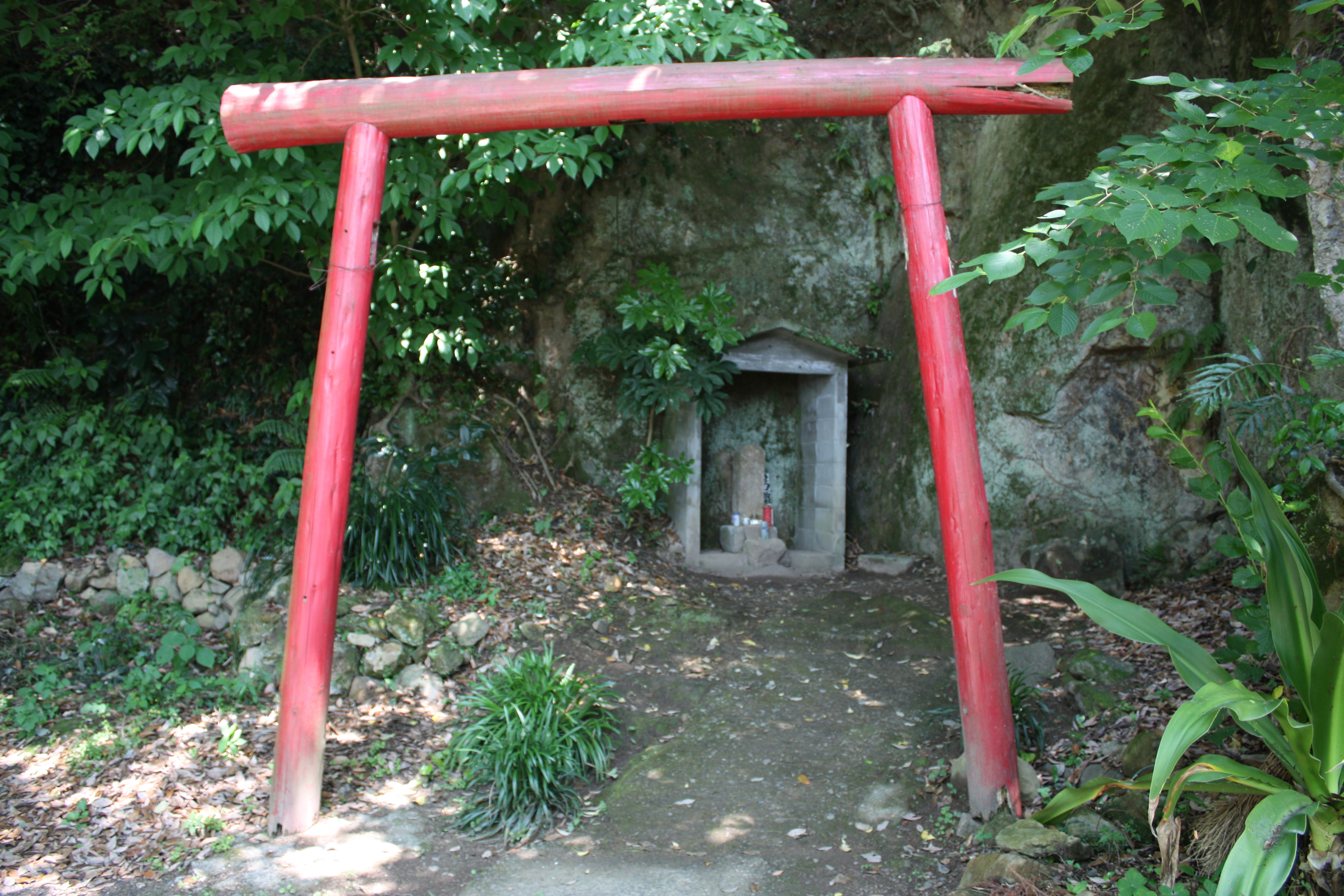 国分敷根にある馬頭観音。近くには医師神社がある。